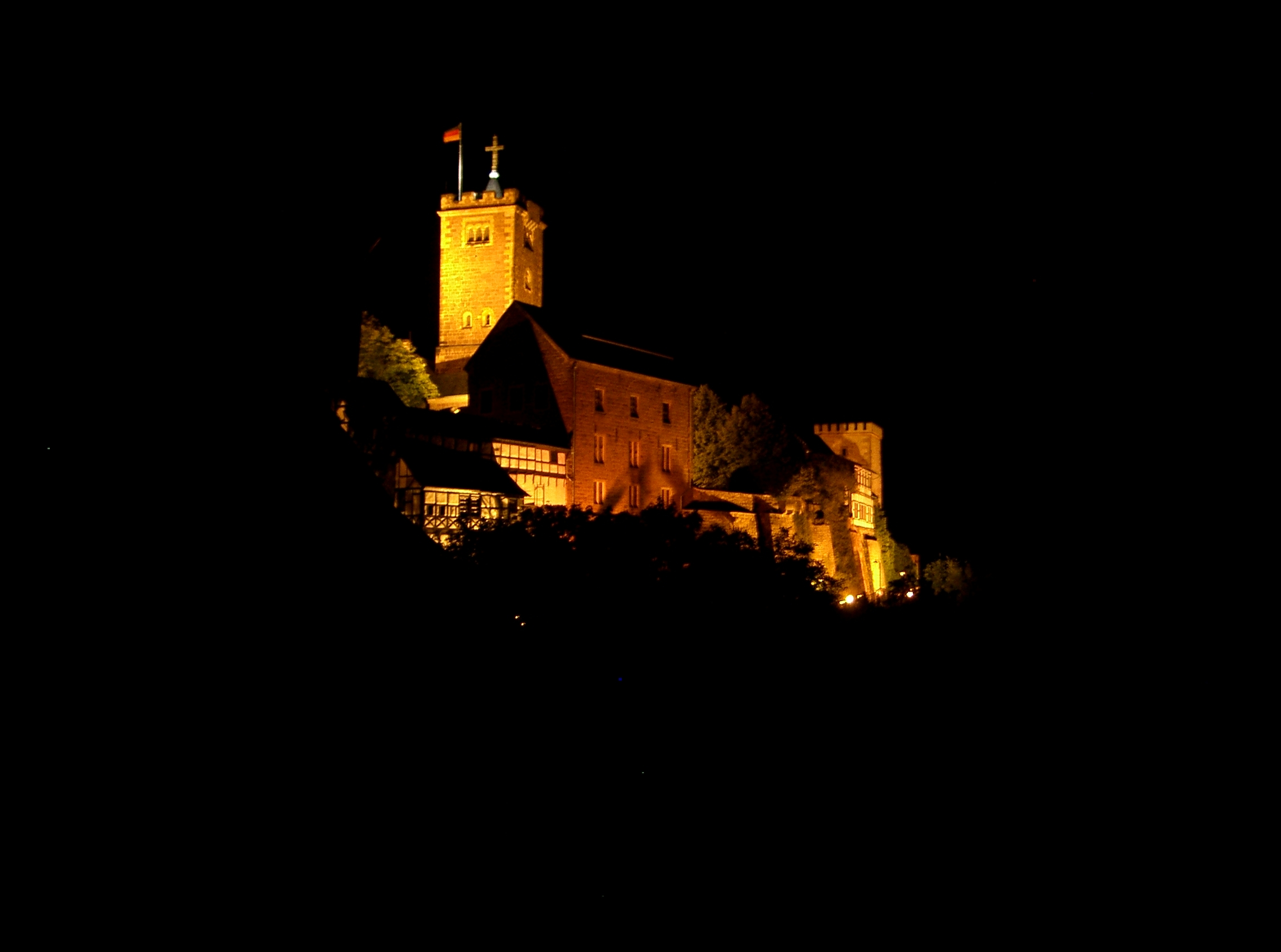 Beleuchtete Wartburg bei Nacht